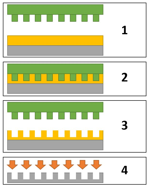 1. Vajaminevad vahendid: roheline - pinnastruktuuriga vorm, kollane - resist, hall - alusmaterjal. 2. Vormi pressimine resisti sisse ning resisti kõvendamine. 3. Vormi eemaldamine resistist. 4. Resisti ja alusmaterjali söövitamine.